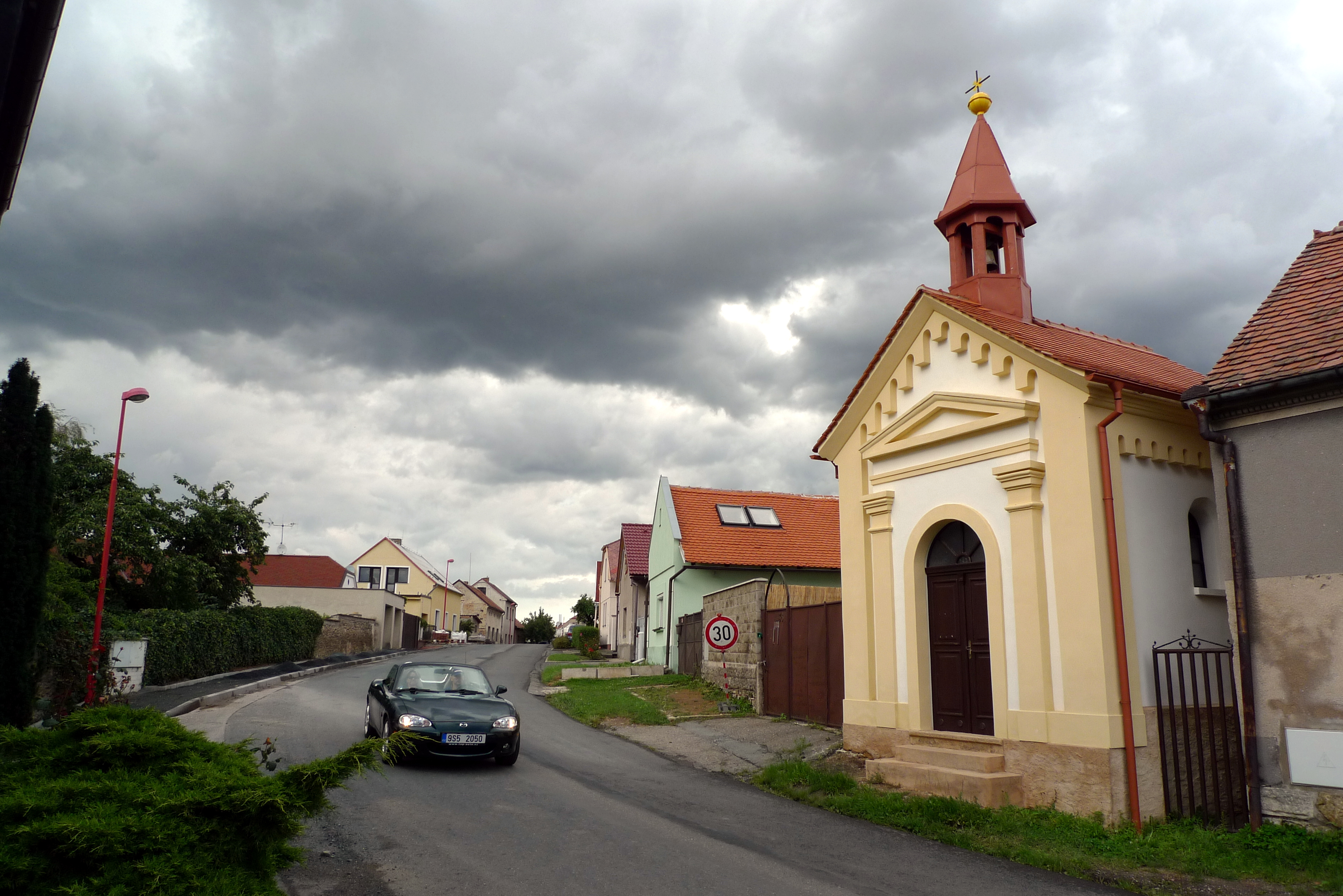 Místní část městysu Červené Pečky - Bojiště v okresu Kolín v České republice